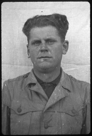 Vinzenz Schöttl (* 30. Juni 1905 in Appersdorf; † 28. Mai 1946 in Landsberg am Lech) war deutscher SS-Obersturmführer und in leitender Funktion in Konzentrationslagern (u.a. Dachau, Auschwitz, Neuengamme) eingesetzt.